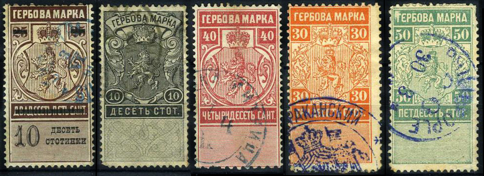 Гербовые марки Третьего Болгарского царства